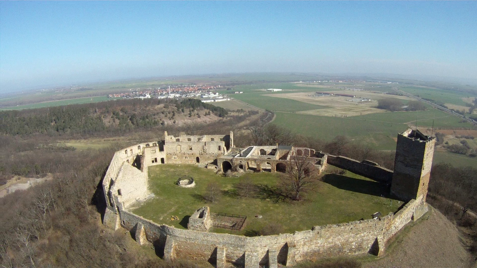 Burg Gleichen aufgenommen von Süden durch meinen Hexacopter.